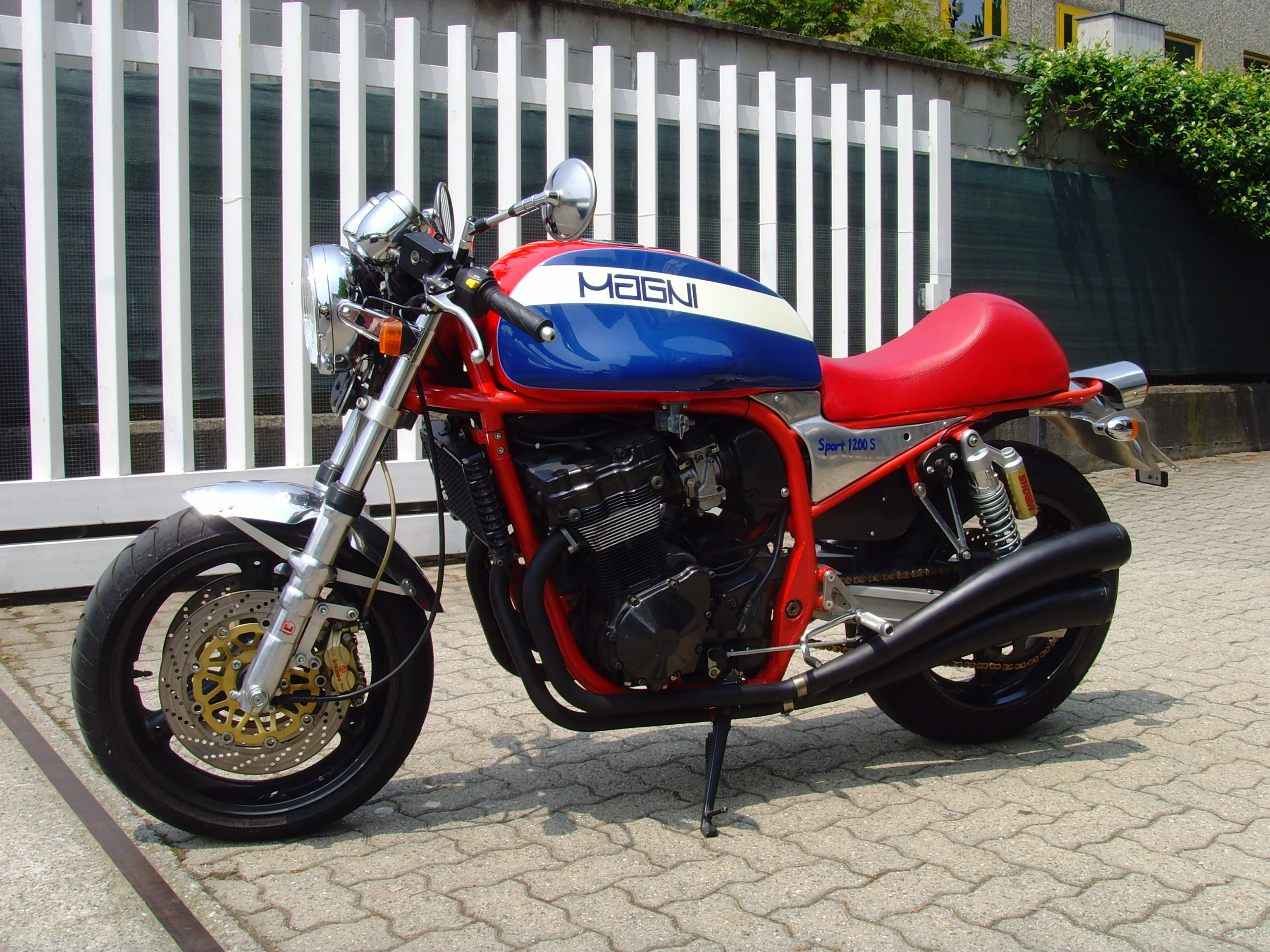 Magni Sport 1200 S con propulsore Suzuki